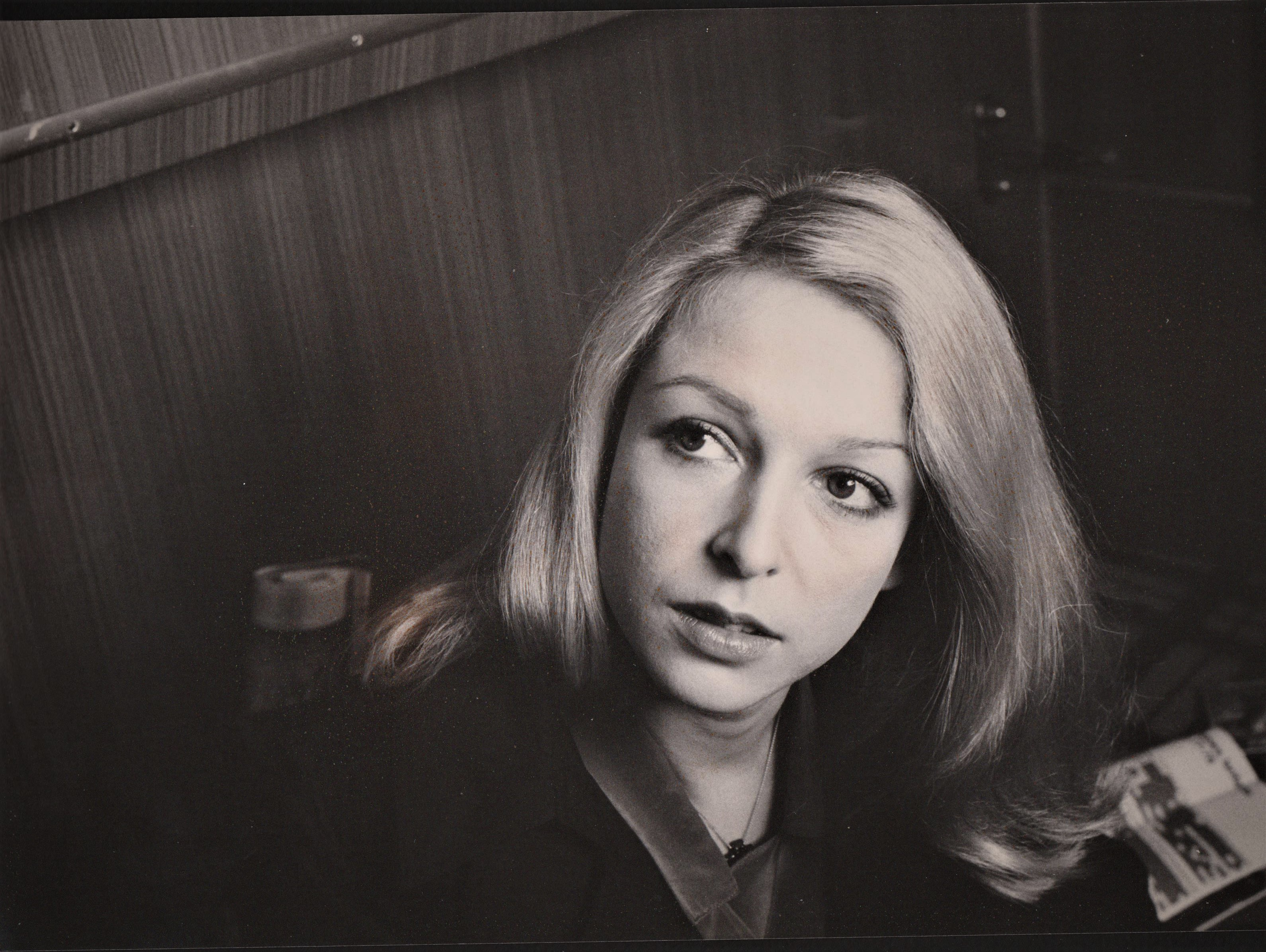 La comédienne Laure Dechasnel (rôle d'Hélène Lehman) dans une scène de L'ordre et la sécurité du monde, film de Claude d'Anna.